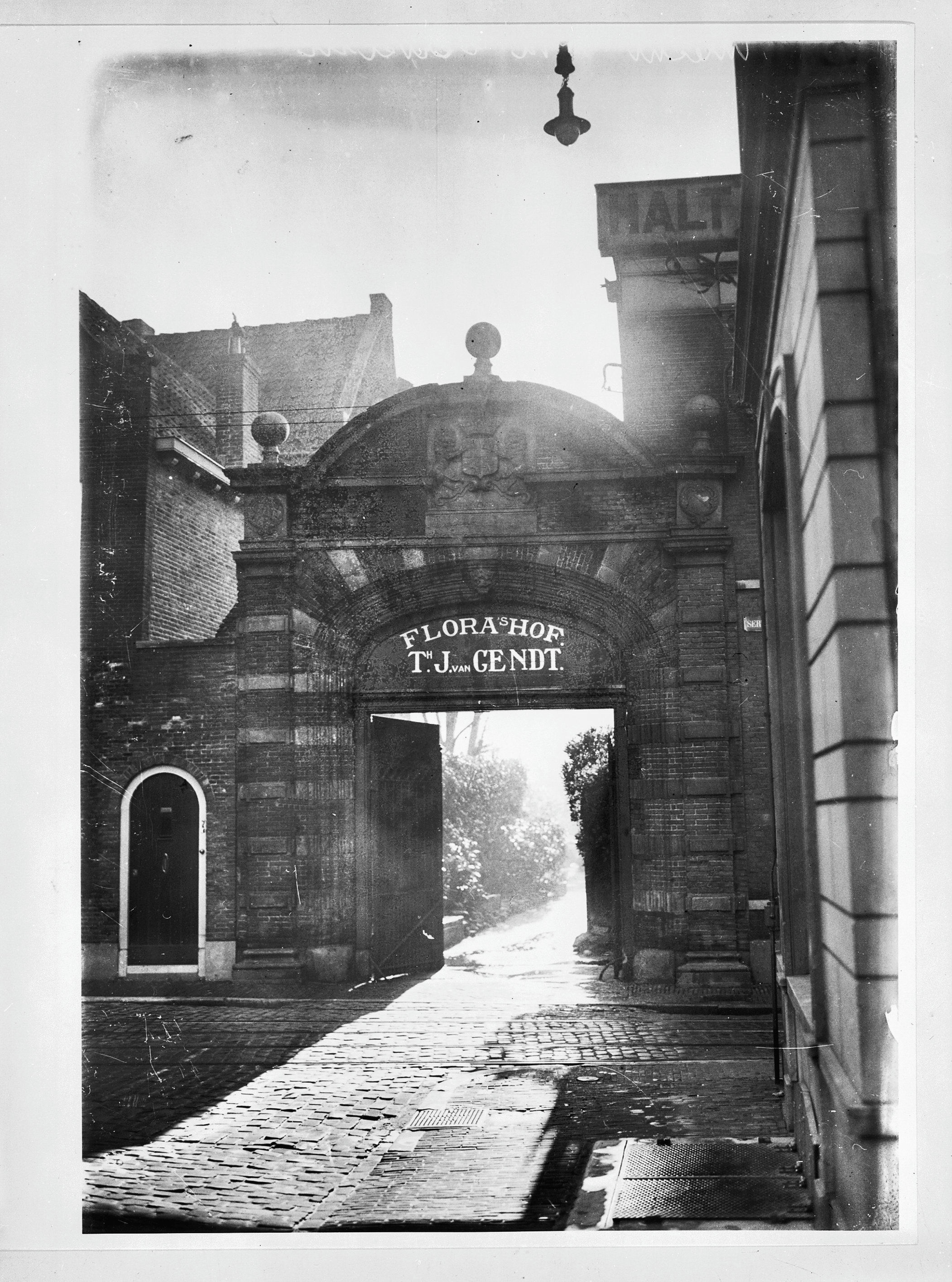 poort van Bisschopshof